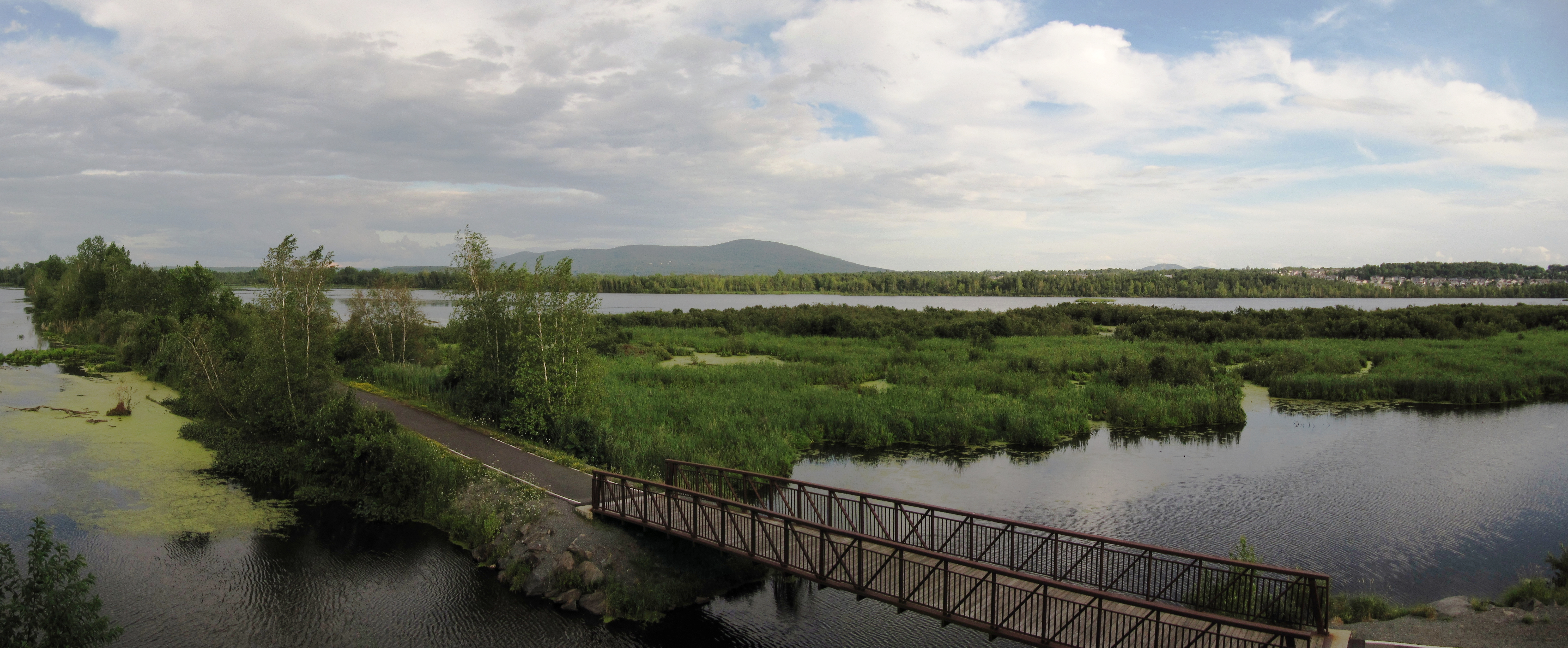 Au loin, le mont Shefford. Photo prise depuis la « Tour d'y voir »